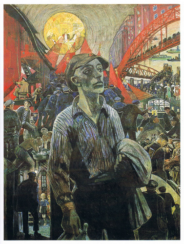 Heinrich Vogeler: Hamburger Werftarbeiter, 1928